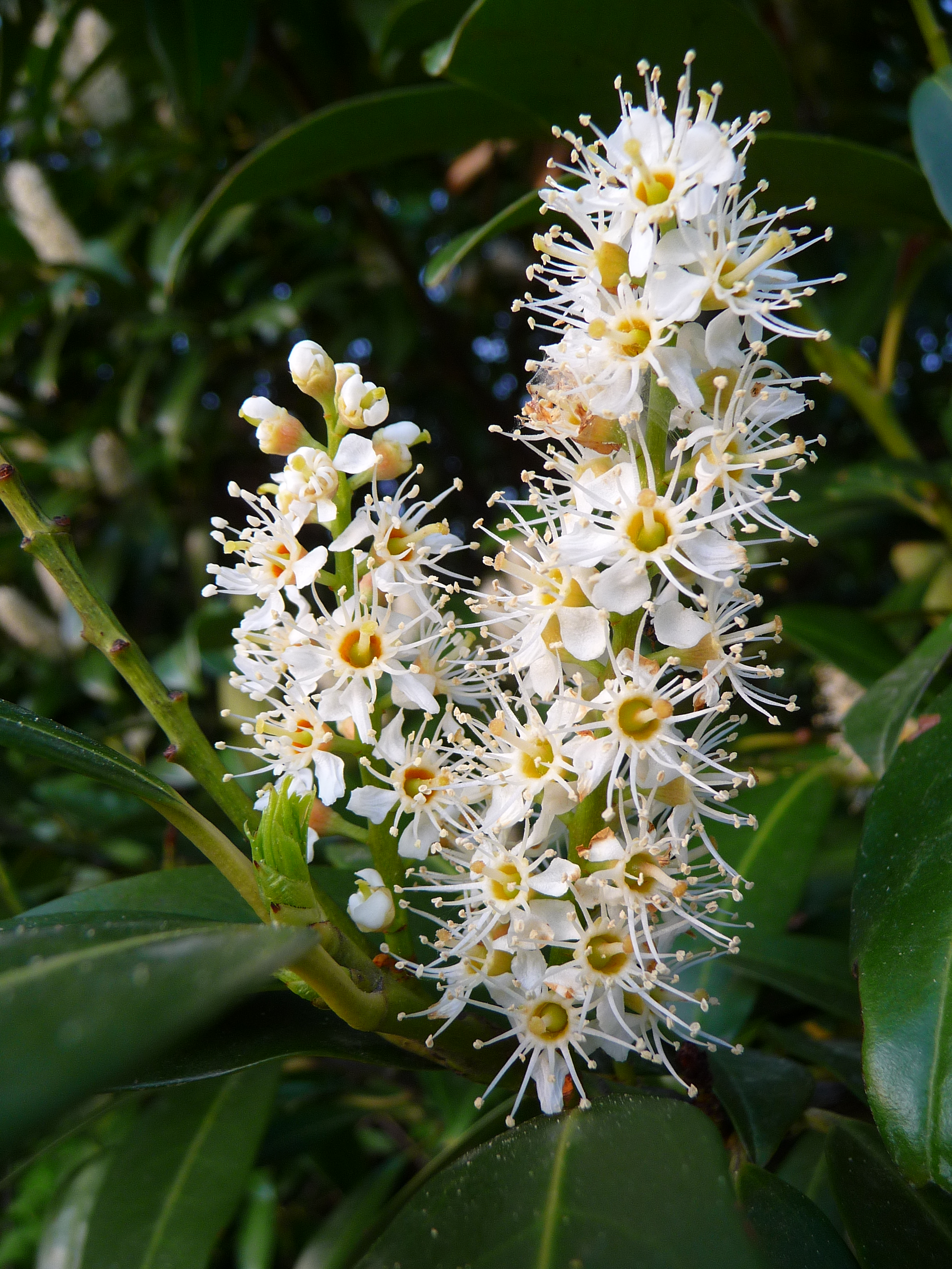 Blüte der Lorbeerkirsche (Prunus laurocerasus), fotografiert in Heidelberg (Baden-Württemberg, Deutschland)